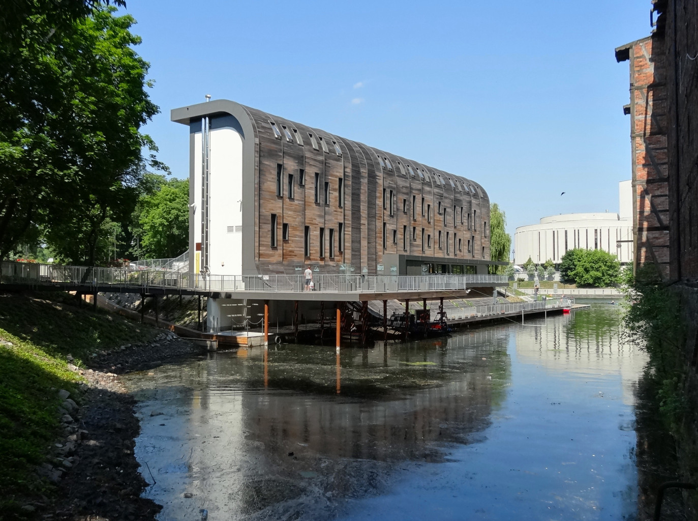 Przystań Bydgoszcz na Wyspie Młyńskiej